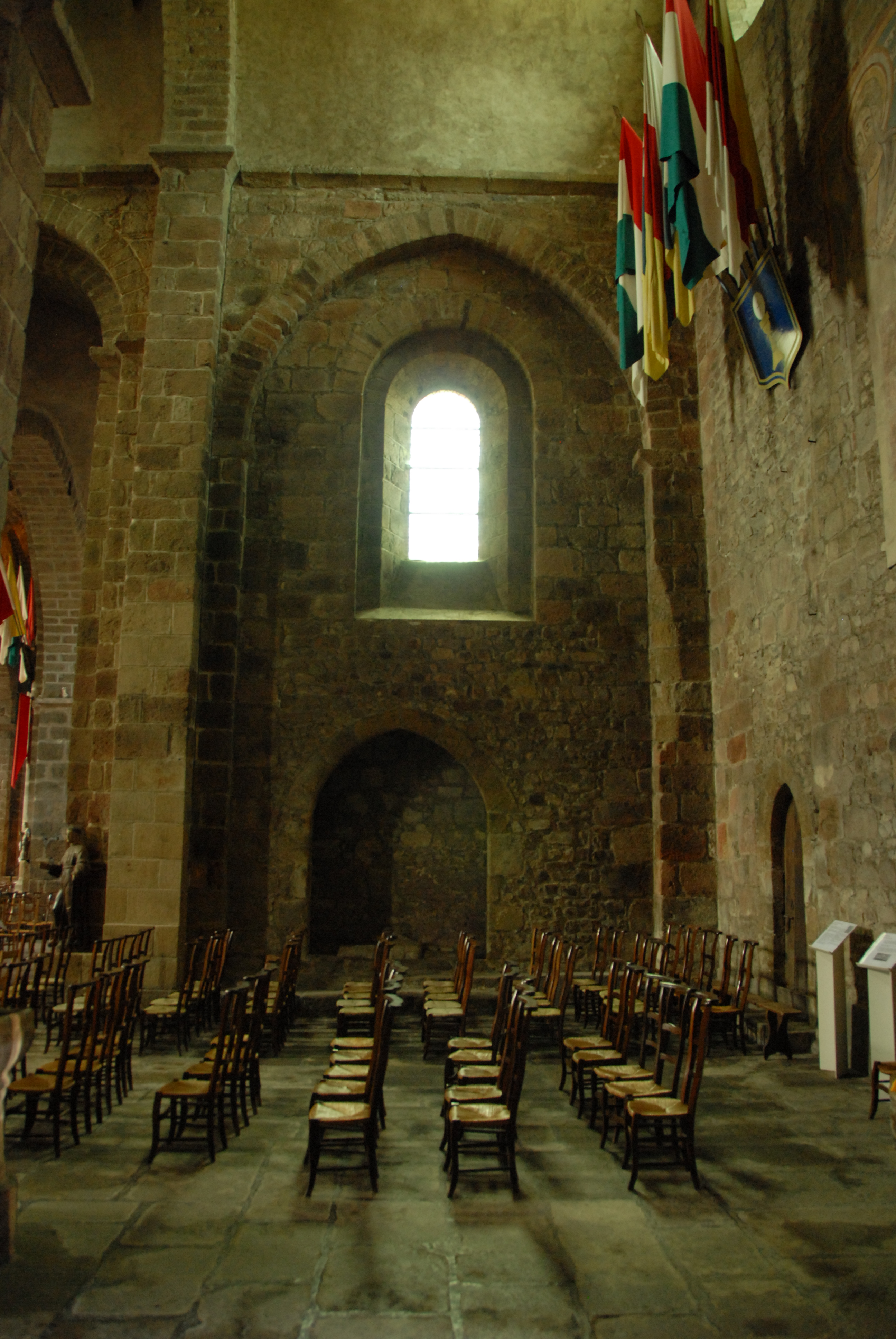 St-Junien, nördl. Querhausarm, Westwand